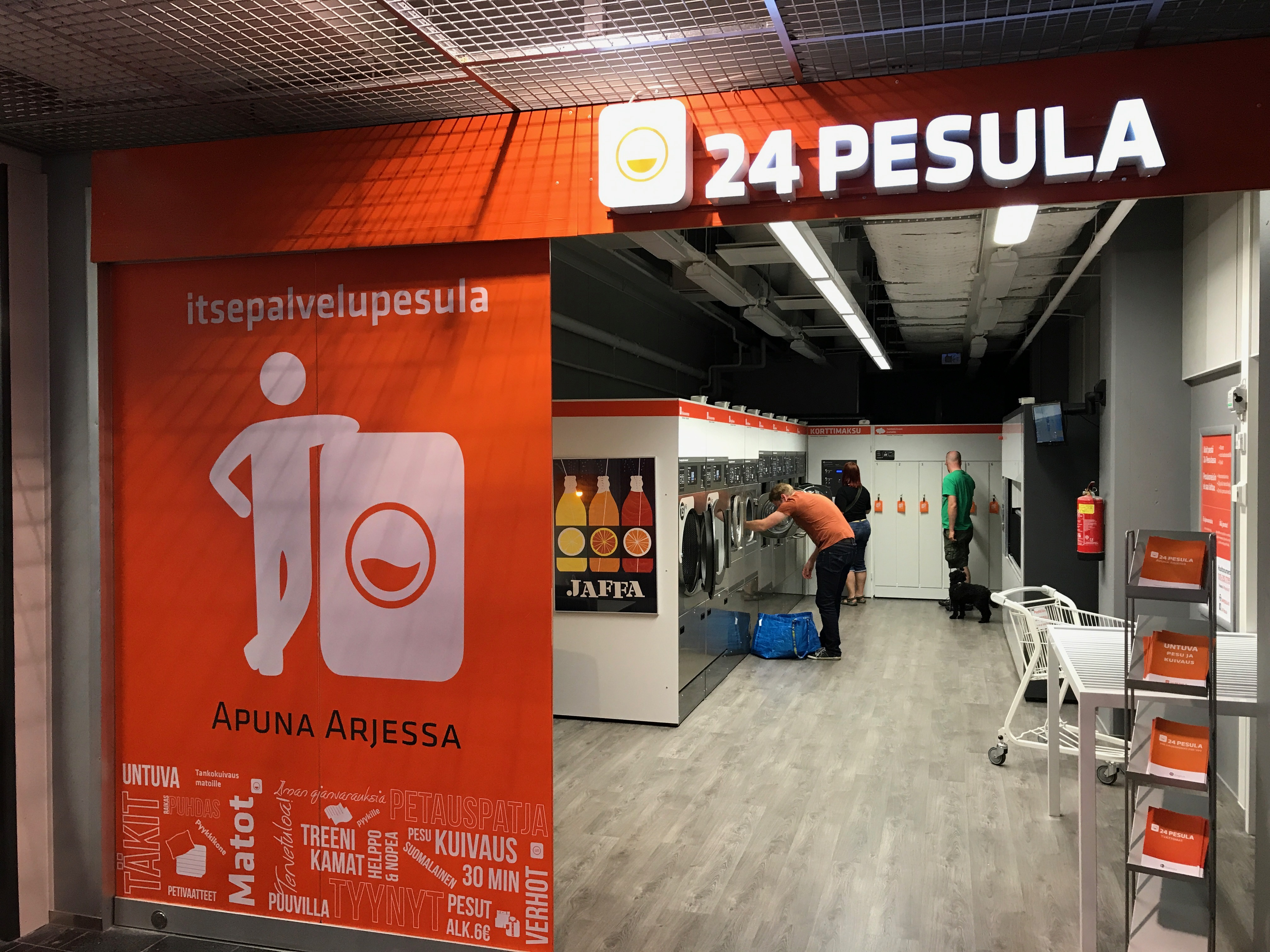 Pesula Kauppakeskus Ristikossa Helsingissä.